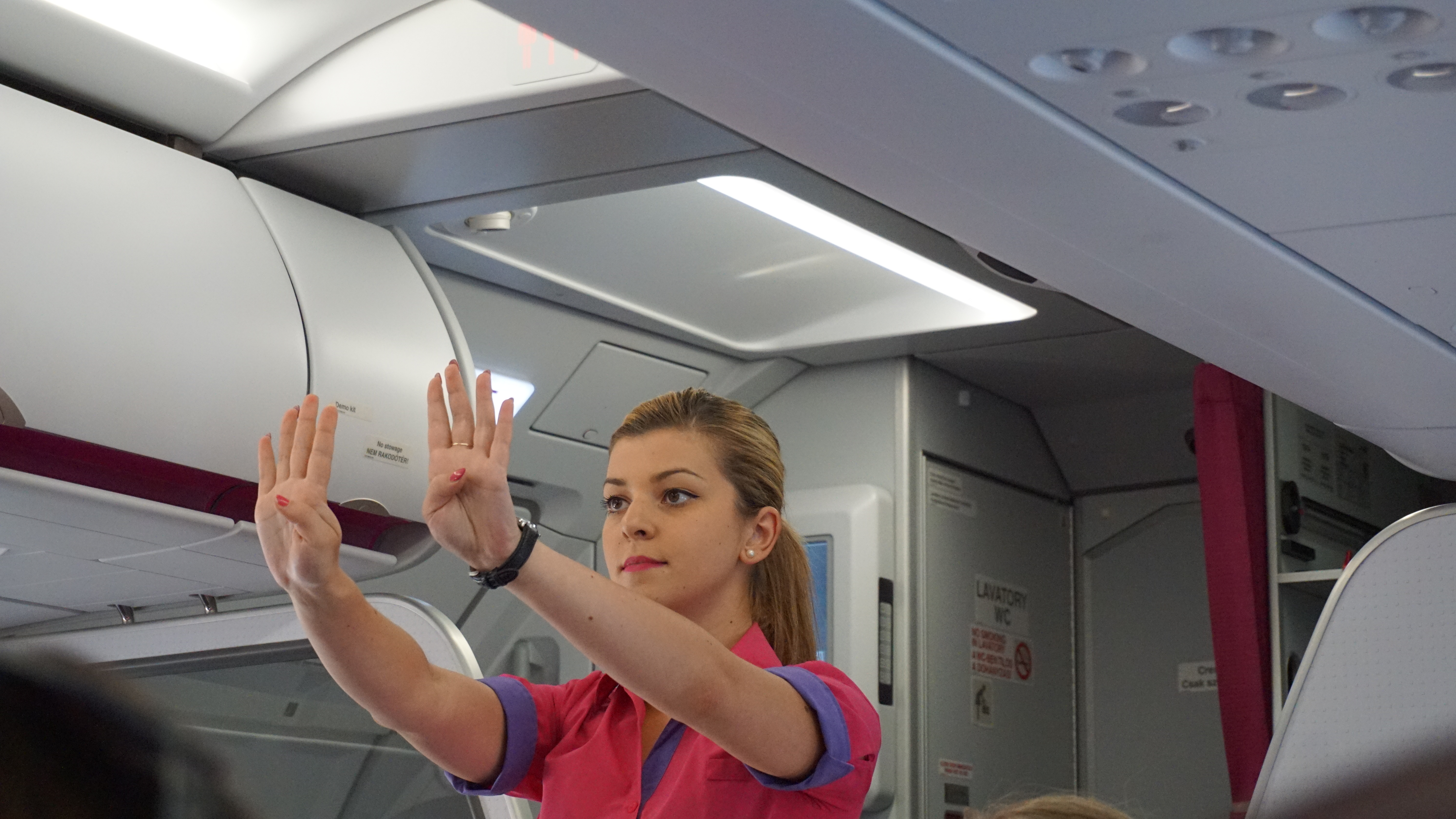 Warsaw (Poland)